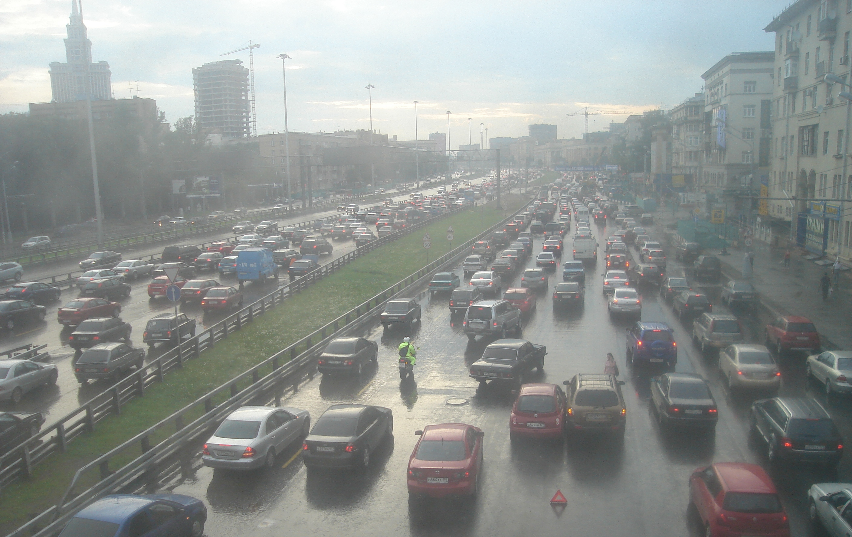 Лењинградски булевар, Москва, јул 2008. аутори: Јован Ђедовић и Павле Јарић